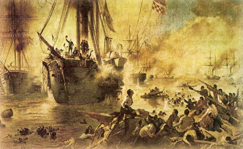 Na esquerda, o almirante Barroso; na direita inferior, chatas paraguaias que transportavam canhôes.